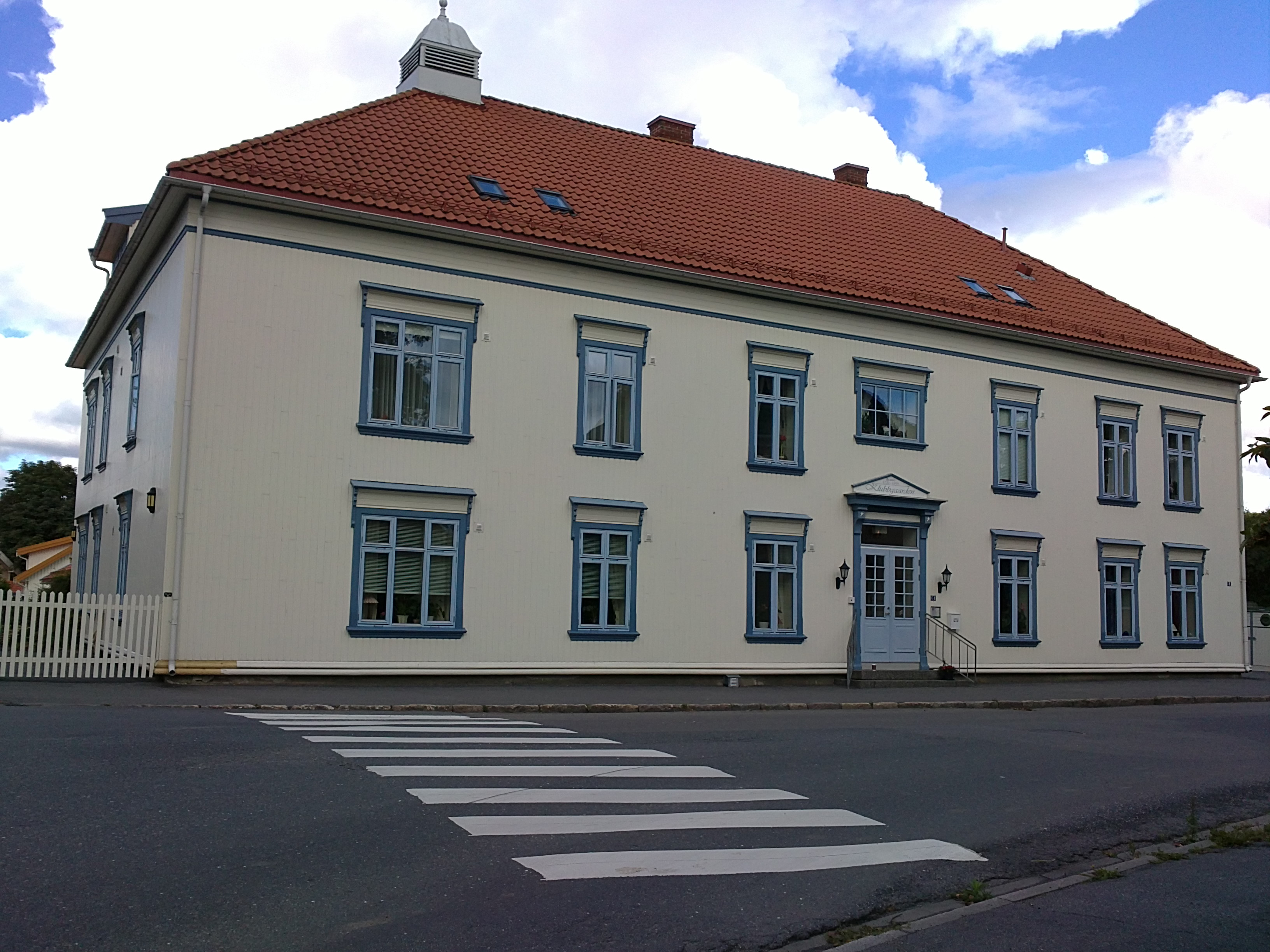 Bilde av Klubbgaarden